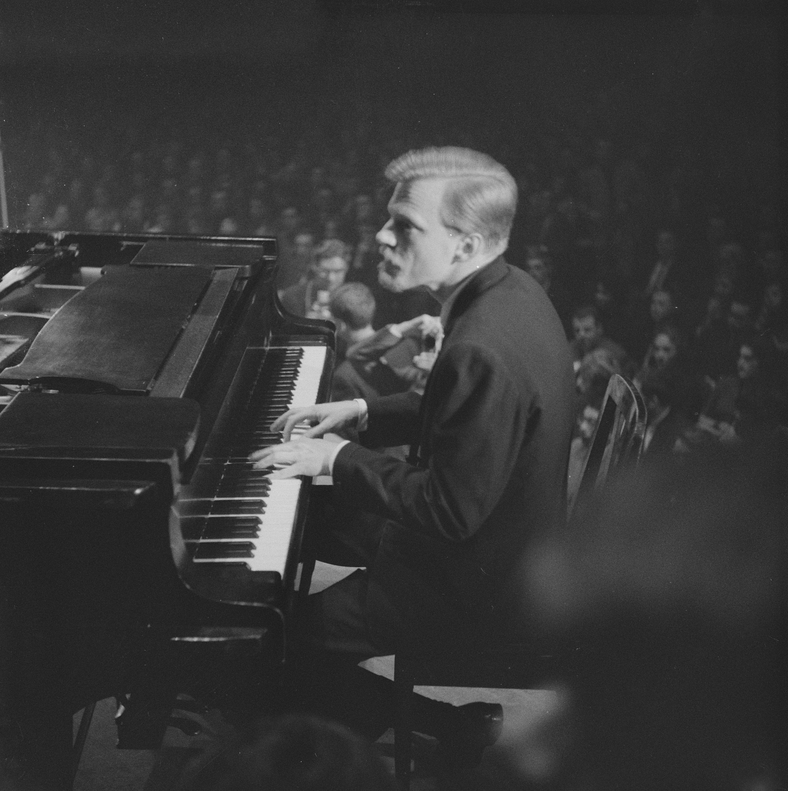 Collectie / Archief : Fotocollectie Anefo Reportage / Serie : [ onbekend ] Beschrijving : Concert van Jerry Mulligan in het concertgebouw Datum : 5 november 1960 Trefwoorden : concerten, pianisten Persoonsnaam : Mulligan, Jerry Fotograaf : Gelderen, Hugo van / Anefo Auteursrechthebbende : Nationaal Archief Materiaalsoort : Negatief (zwart/wit) Nummer archiefinventaris : bekijk toegang 2.24.01.03 Bestanddeelnummer : 911-7438